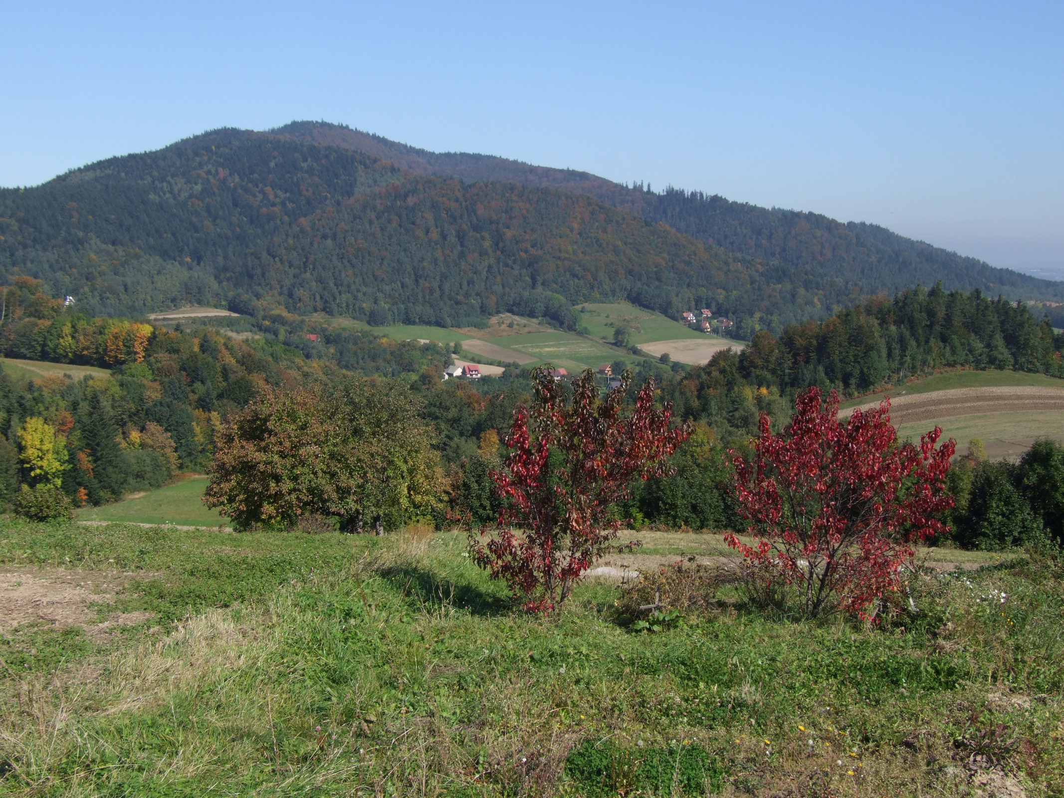 Ciecień. Widok z przełęczy Wielkie Drogi (Beskid Wyspowy)